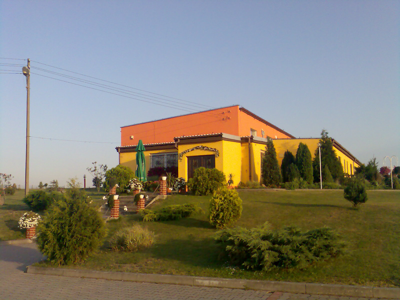 Sala sportowo-taneczna w Ciochowicach. Zdjęcie prywatne, wykonane samodzielnie telefonem komórkowym.